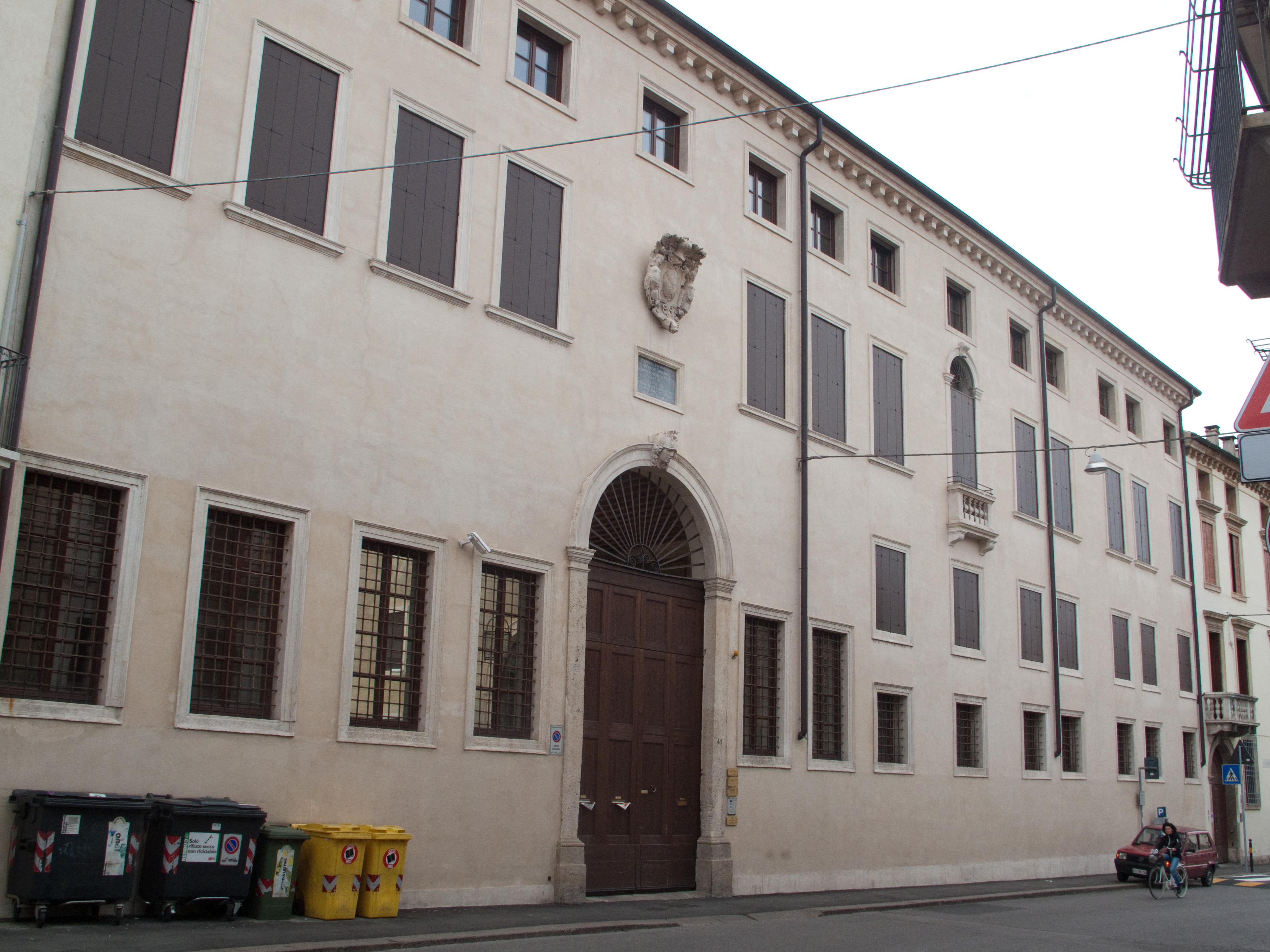 Vicenza - Borgo Pusterla - Palazzo Giustiniani Baggio, facciata